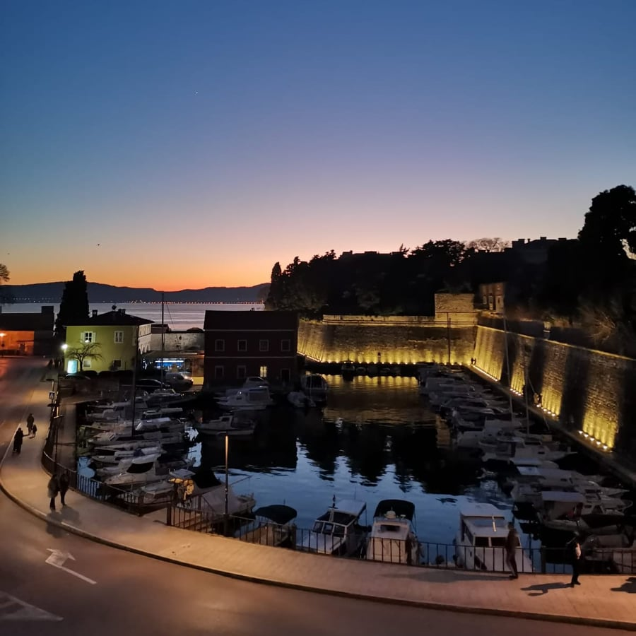 Stara luka Foša